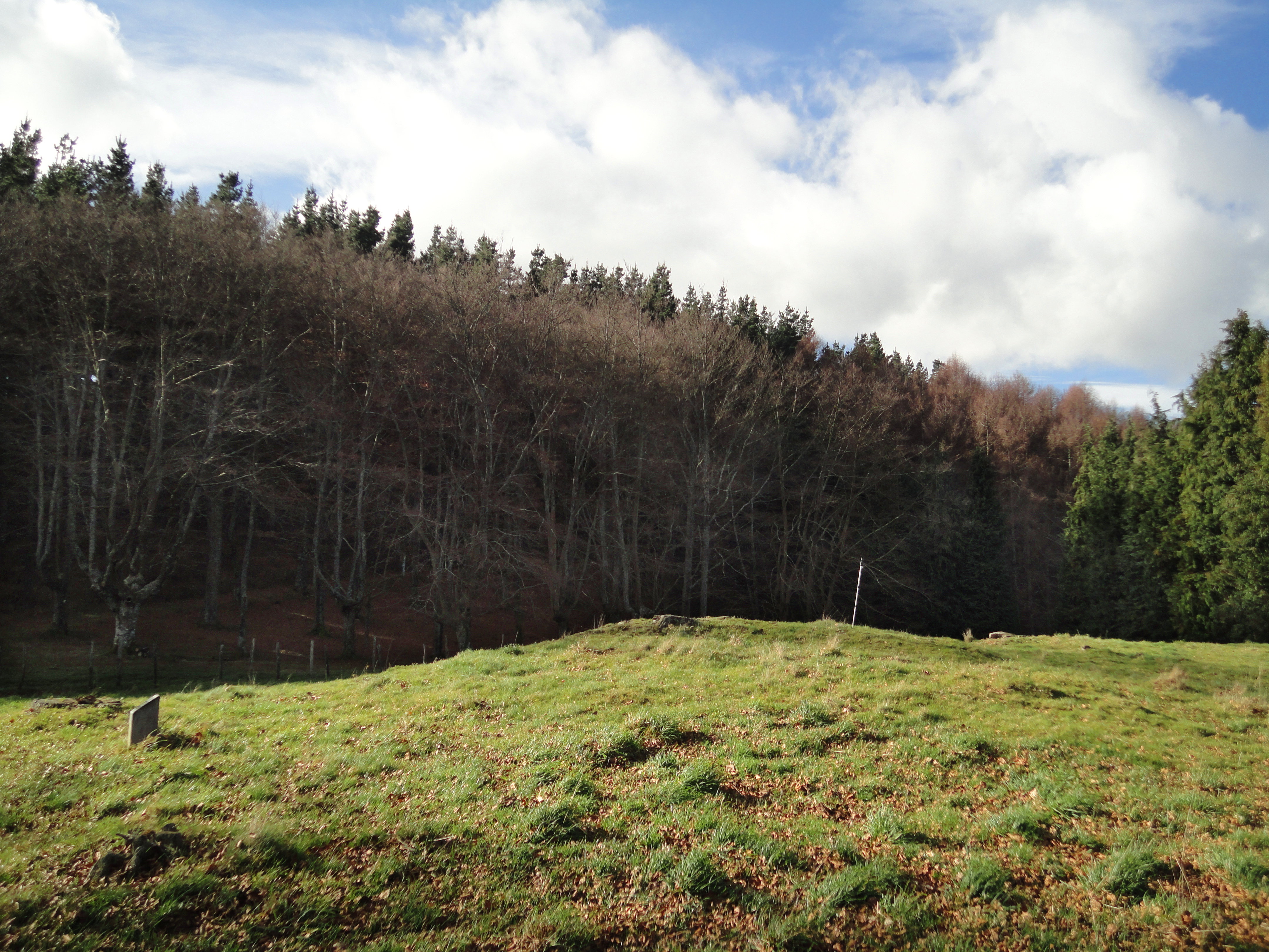 Goinzari Zelaia tumulua